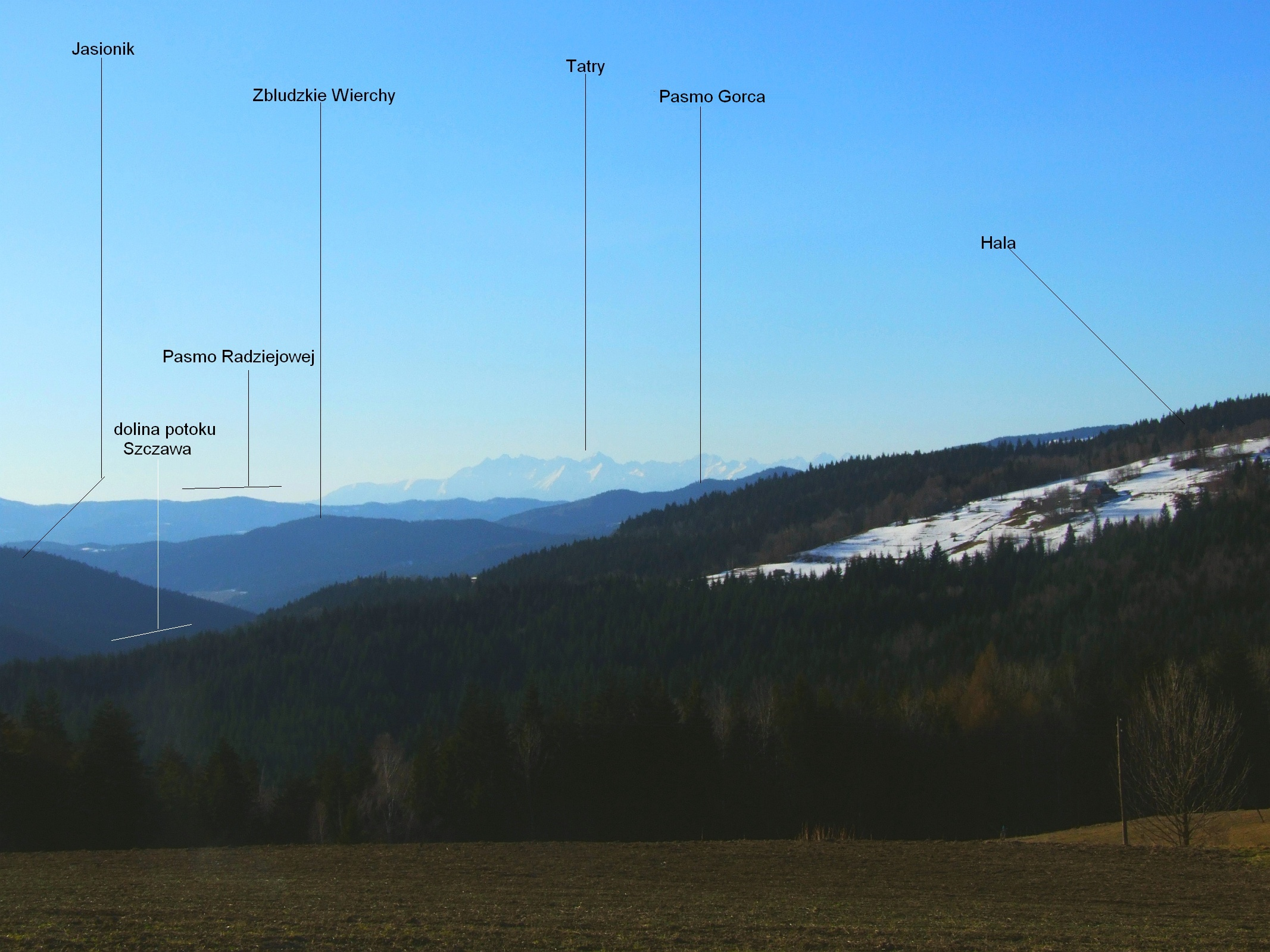 Widok z osiedla Bukowina na Zalesiu (grzbietowy szlak turystyczny Przełęcz Słopnicka-Mogielica)